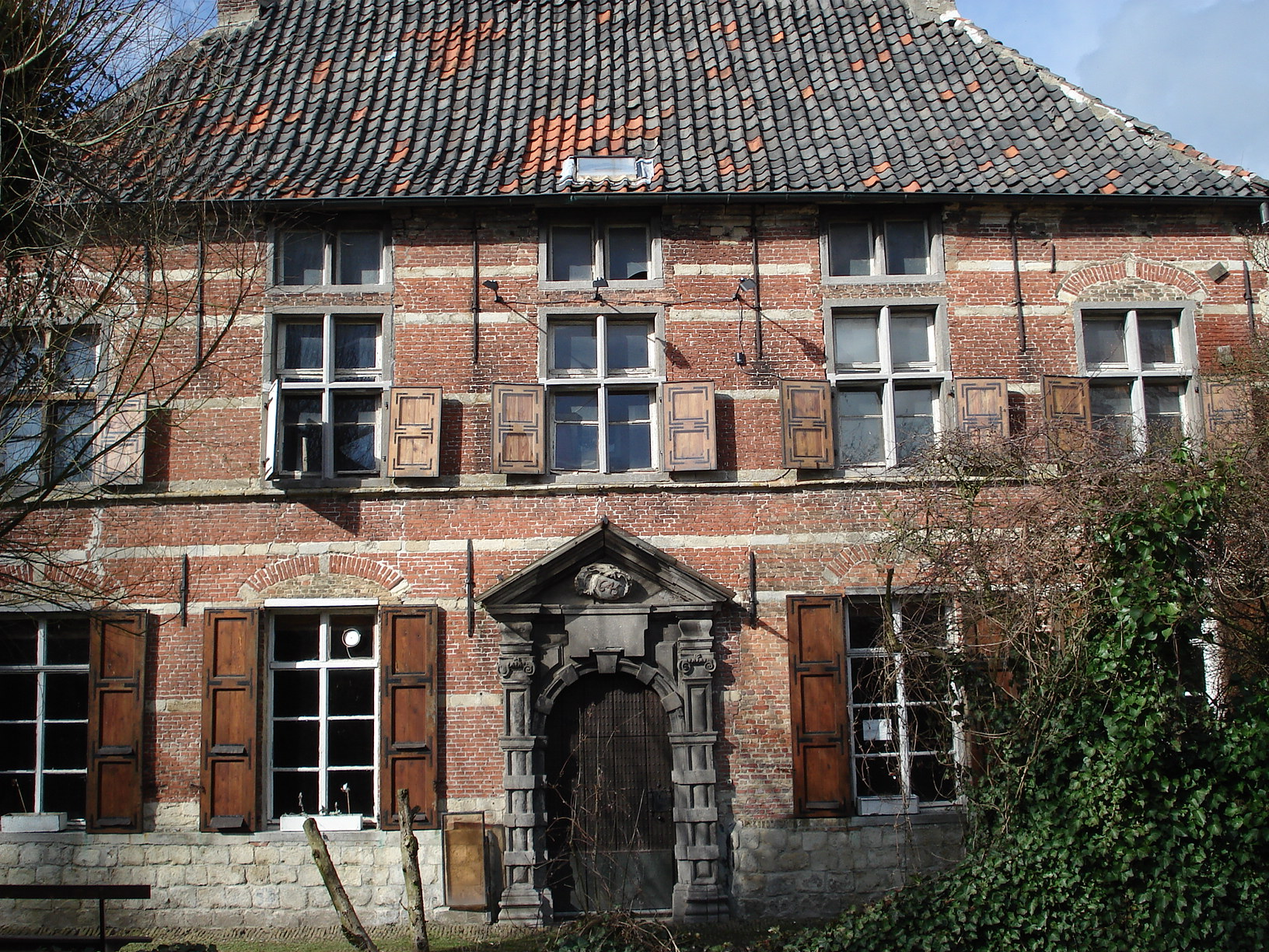 Doel (gem. Beveren), Hooghuis (Renaissance 1614).